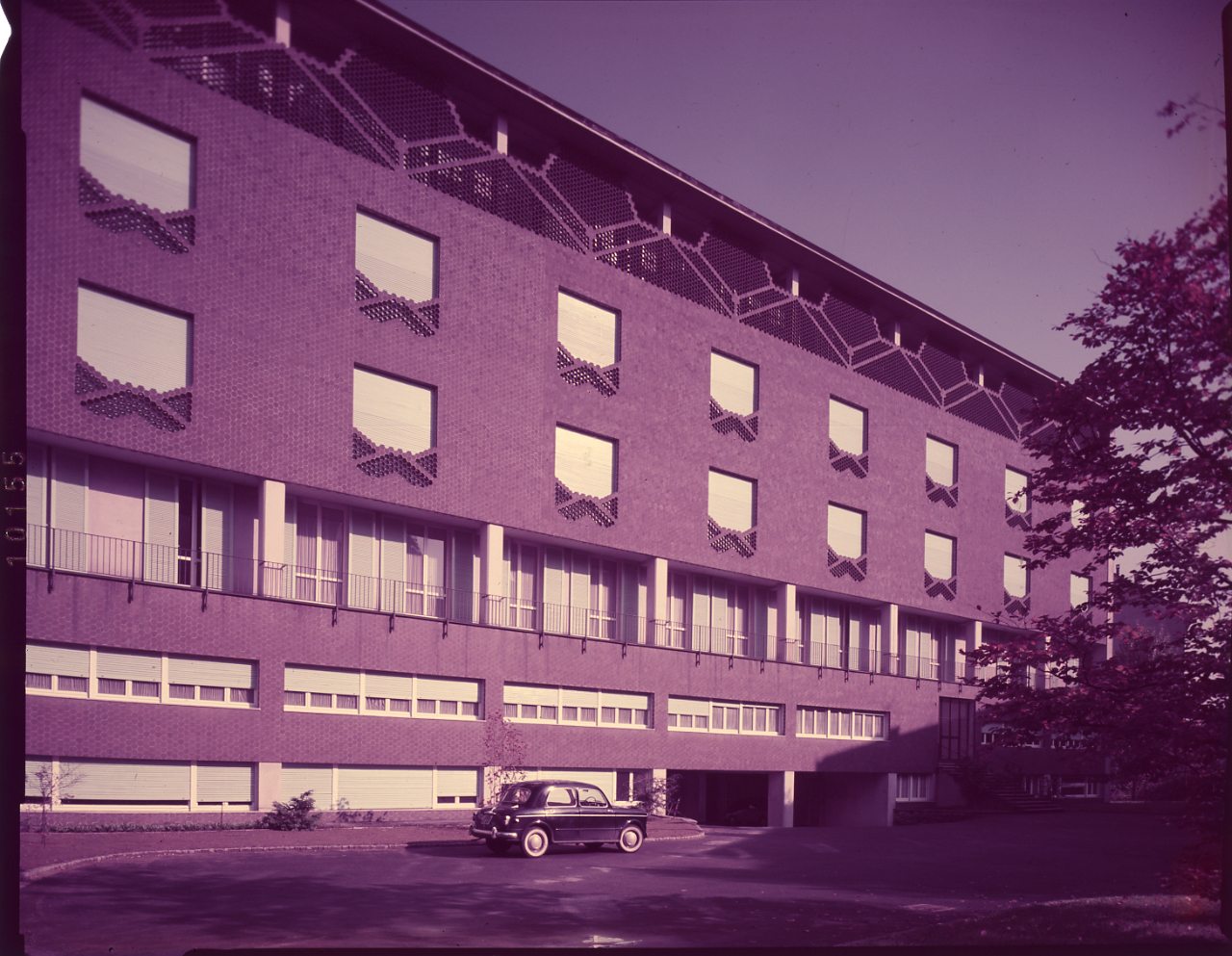 Servizio fotografico : Monticello Brianza, 1980 / Paolo Monti. - Buste: 2, Fototipi: 2 : Diapositiva, sviluppo cromogeno/ pellicola ; 10x12. - ((Serie costituita da 2 dispositive identificate con i nn.: 489-490. La suddetta serie è contenuta nella scatola identificata con la numerazione 471/620GC. - Fonte: Rubrica di Paolo Monti: Archivio 10x12 (ultimi numerati) - dal G1 al (s.d.), presso Archivio Paolo Monti